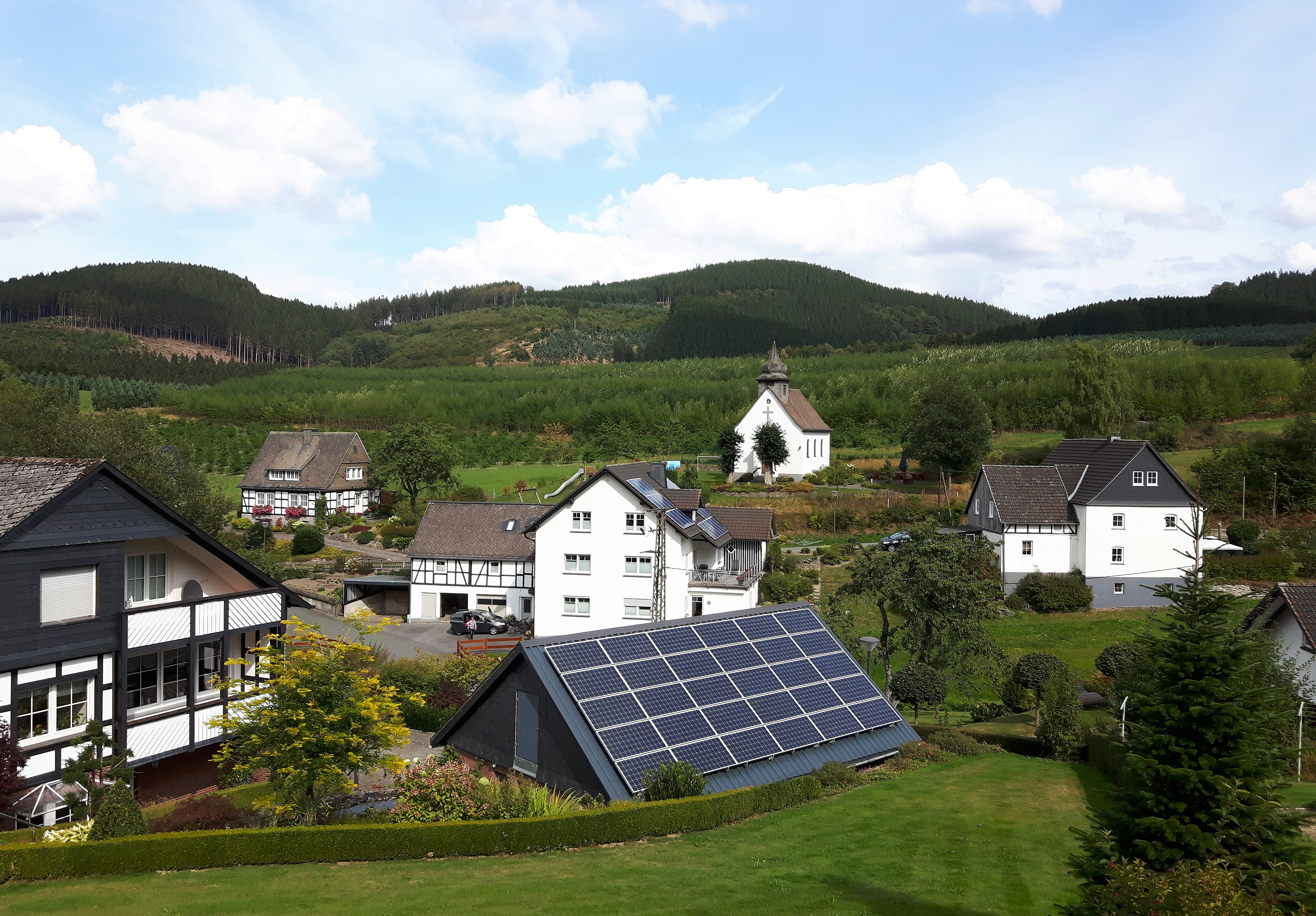 Oberrarbach, 2018